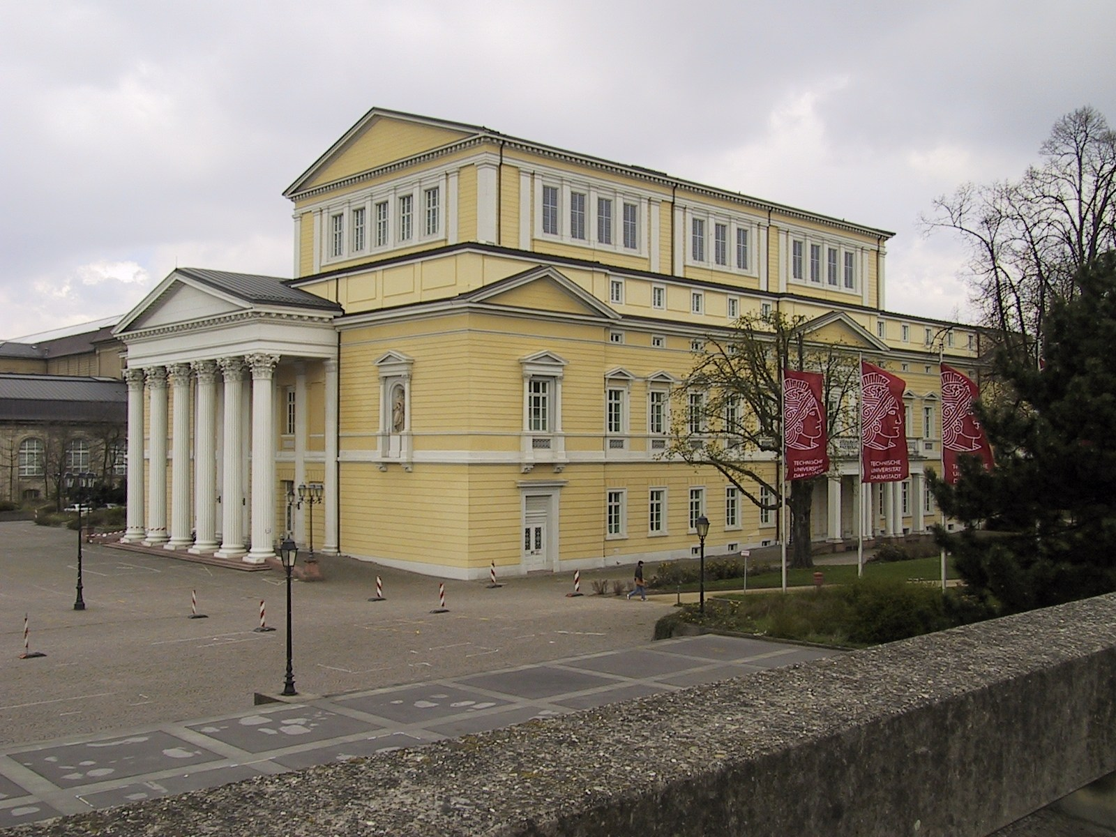 Staatsarchiv in Darmstadt, früheres Hoftheater